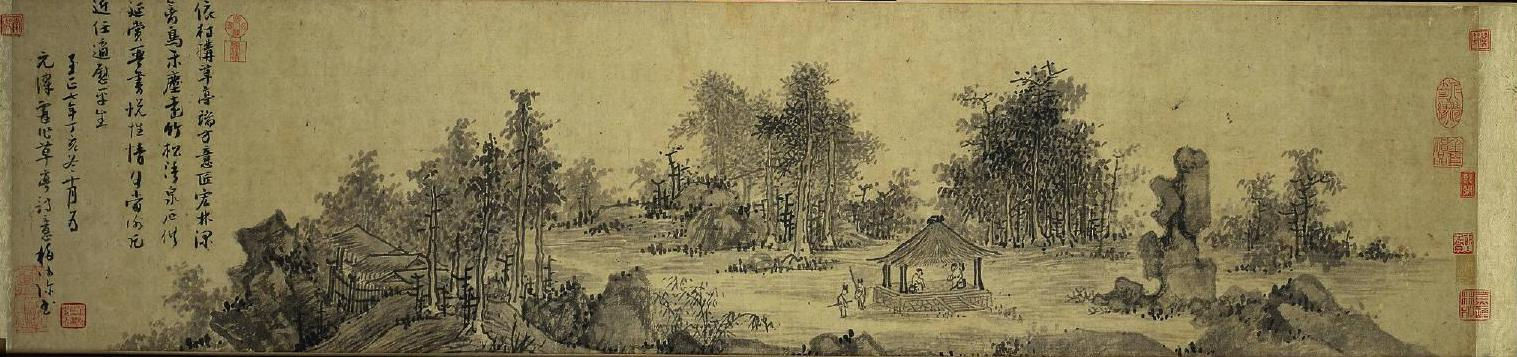 呉鎮「草亭詩意図巻」 元・至正7年（1347） 紙本墨画 23.8 x 99.4 cm アメリカ合衆国、オハイオ州、クリーヴランド美術館